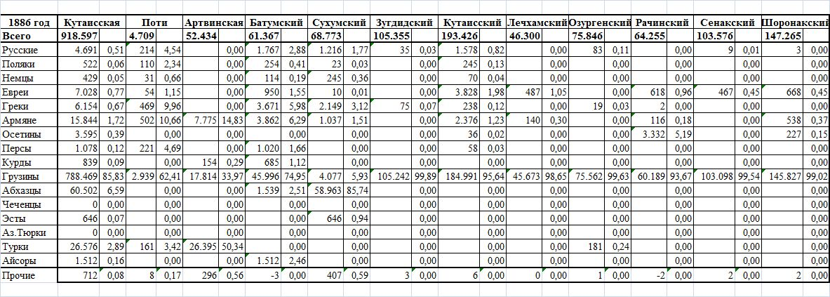 Сводные данные посемейных списков Кавказа за 1886 год